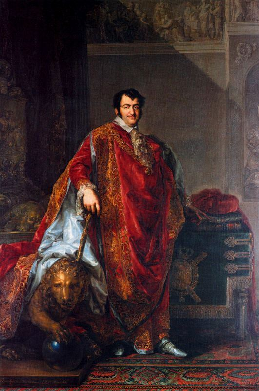 Retrato del rey Fernando VII de España (1789-1833), revestido con el hábito y manto de la Orden del Toisón de Oro, que fue fundada en 1429 por Felipe III de Borgoña, duque de Borgoña y conde de Flandes.